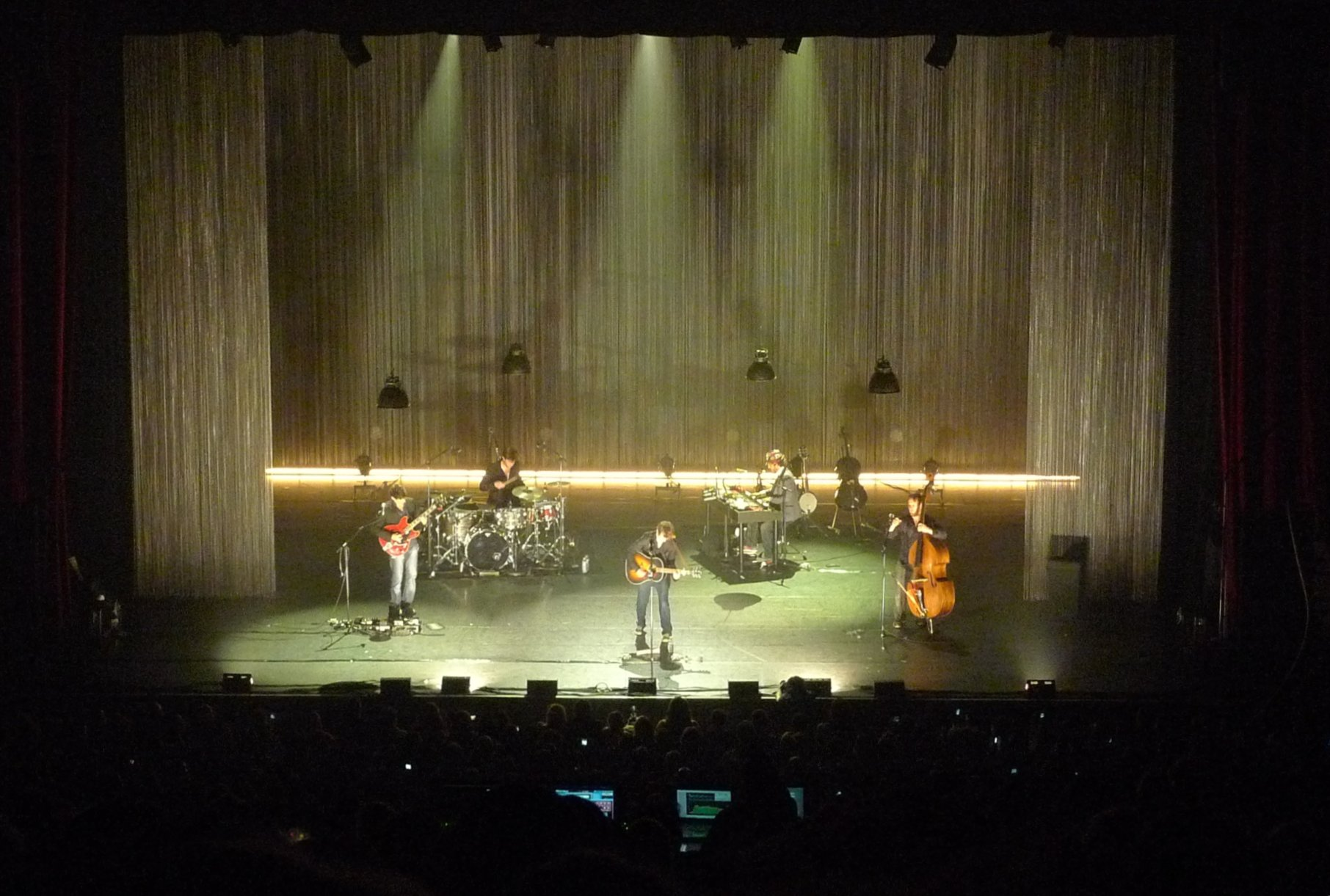 concert de Renan Luce à l'Olympia, Tournée des Miros 2010